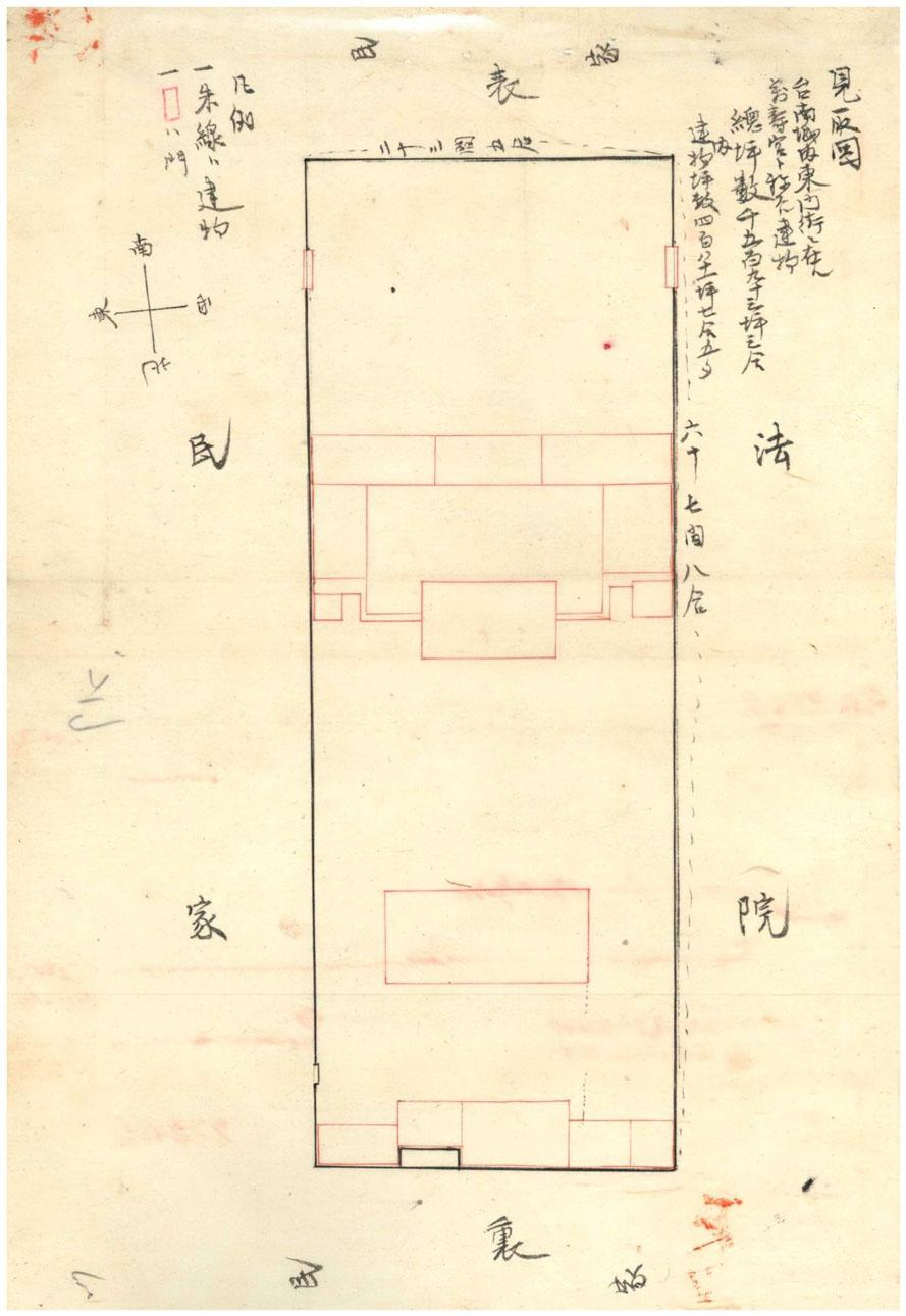 於1897年，將萬壽宮作為台南法院宿舍使用